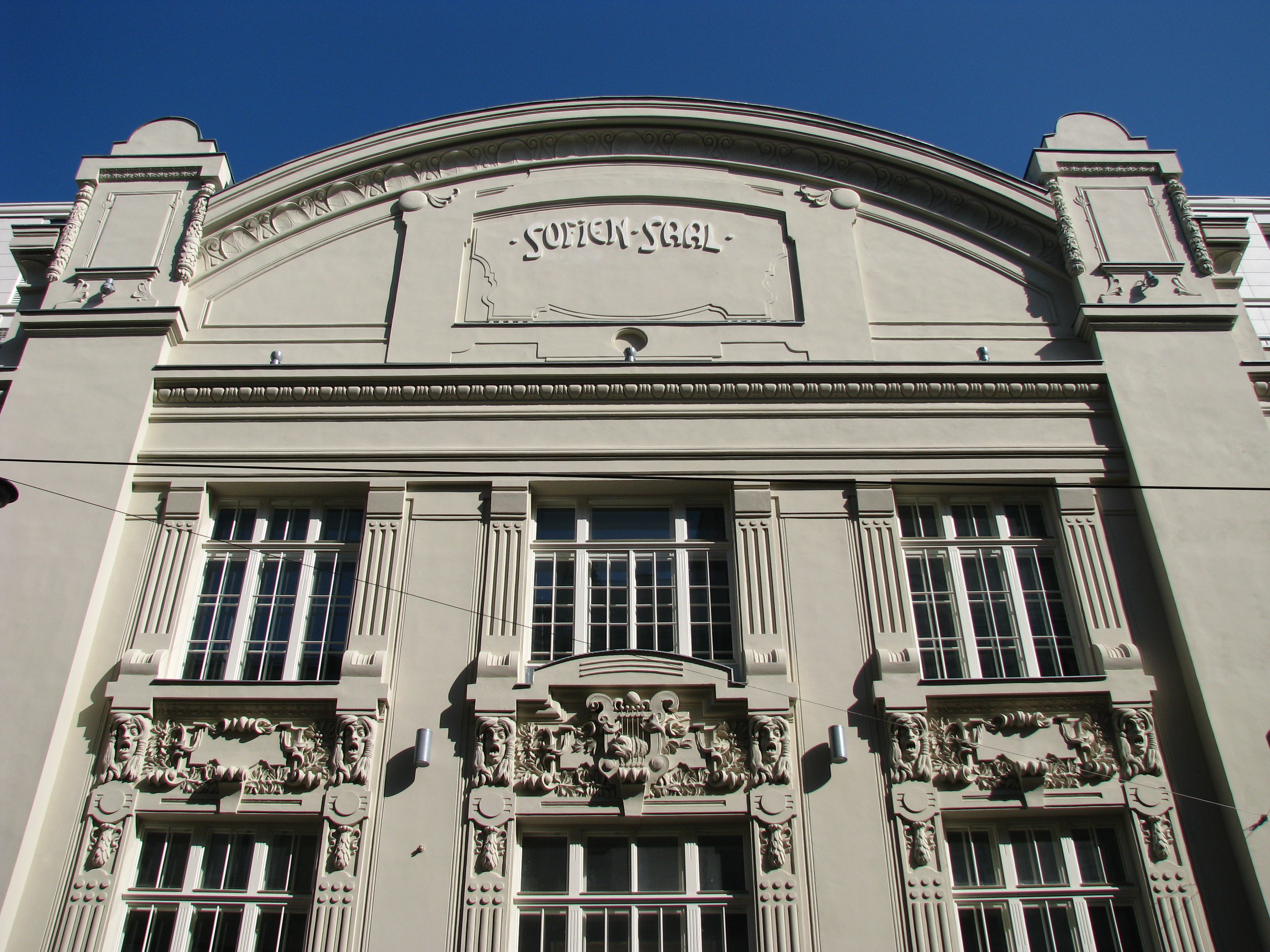 Sophiensäle, ehem. Sophienbad